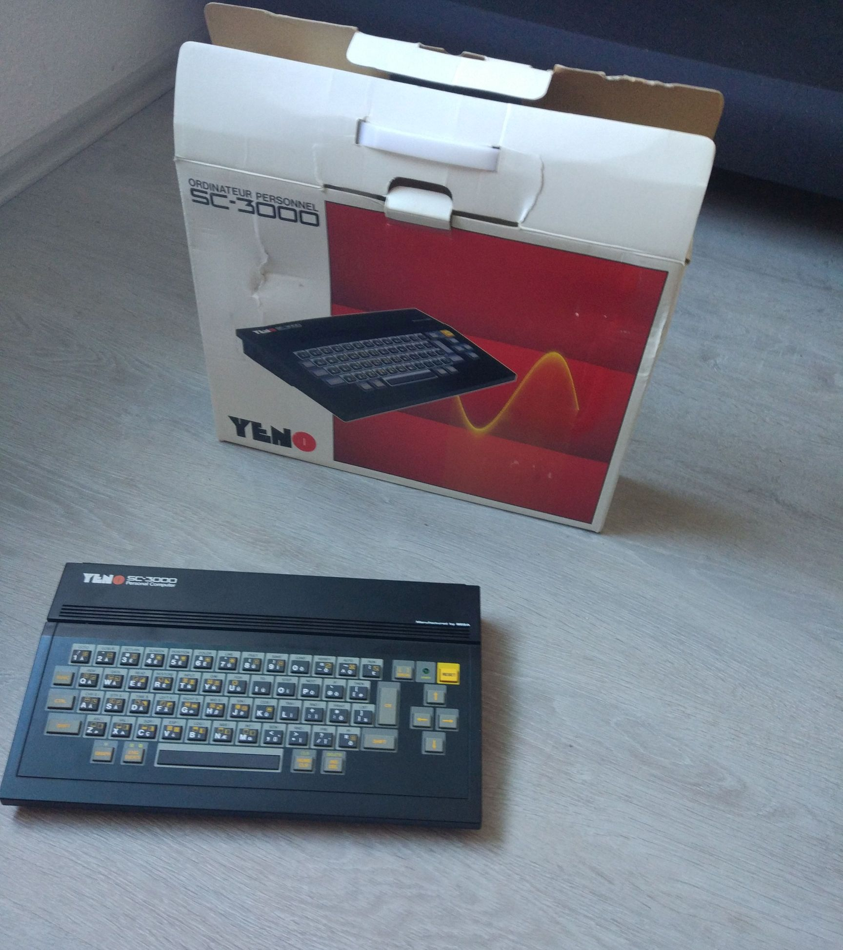 Yeno SC-3000, Franz. Lizenznachbau des Sega SC-3000